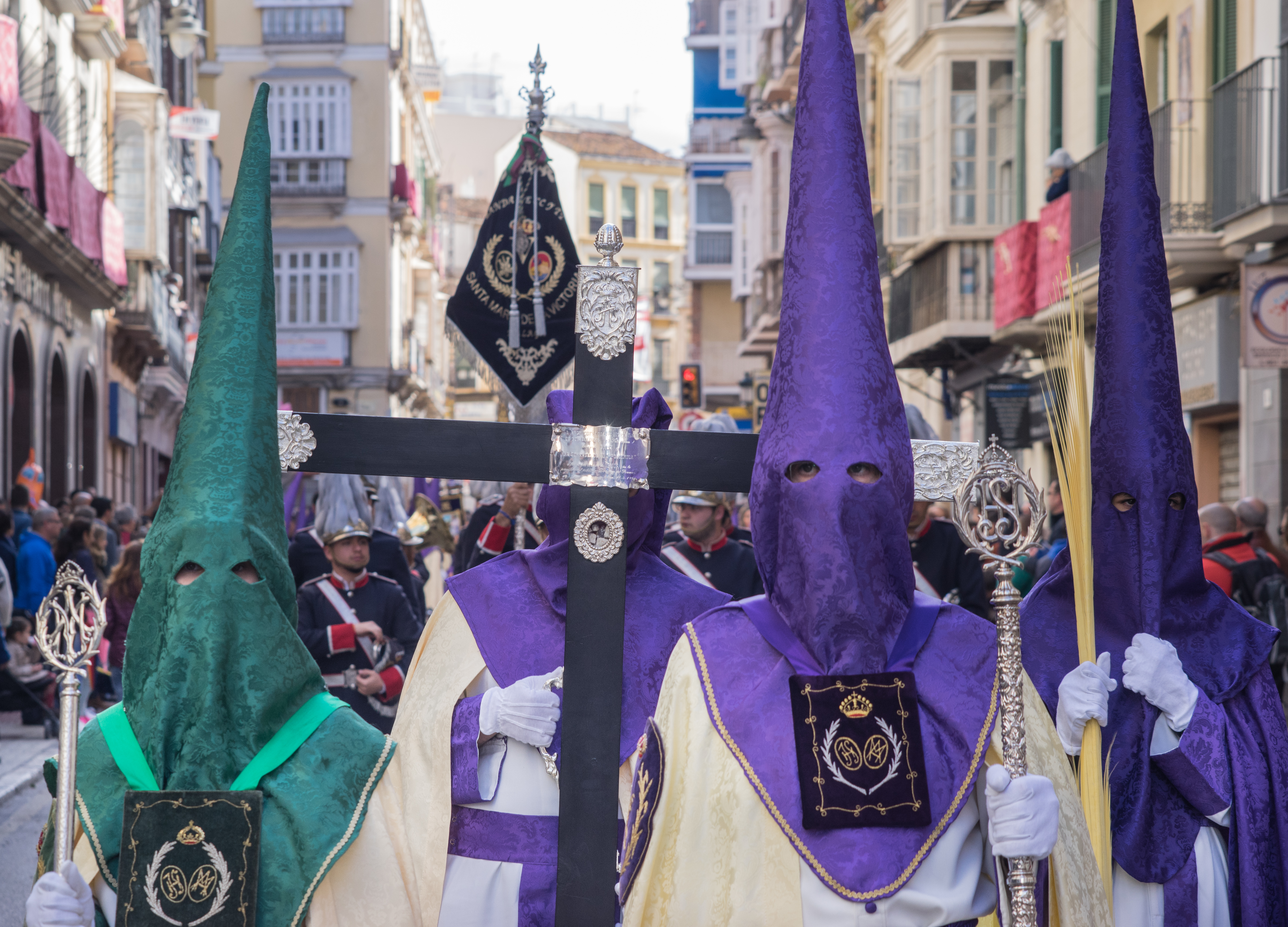 Cruz Guía de la Real Cofradía de Nuestro Padre Jesús a su Entrada en Jerusalén y María Santísima del Amparo This is a photography of a Folklore festival in Spain (Wikidata id Q9075883).